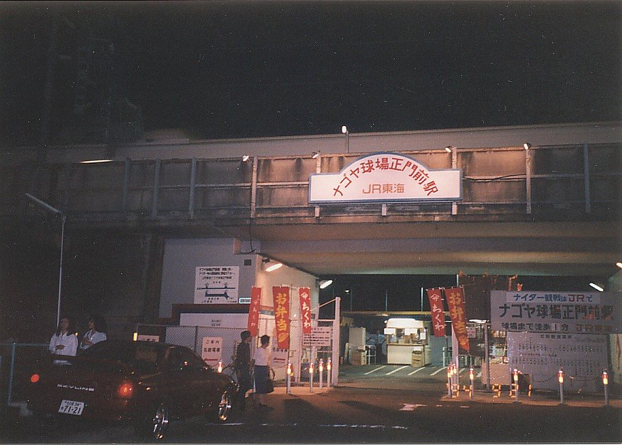 ナゴヤ球場正門前駅 駅入口